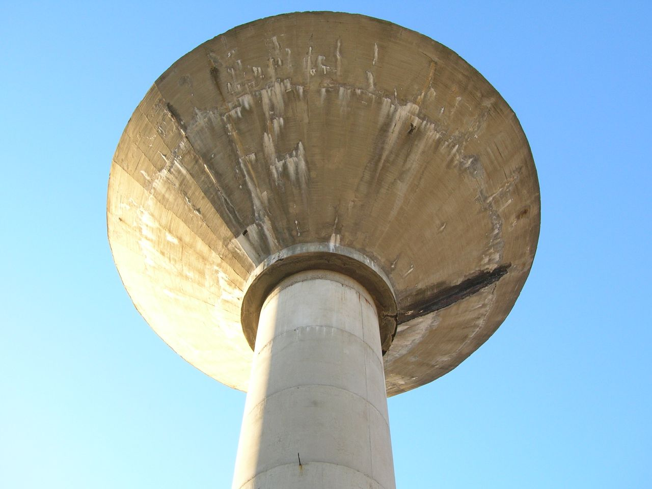 San Martin del Camino - Deposito de agua situado al lado del albergue.